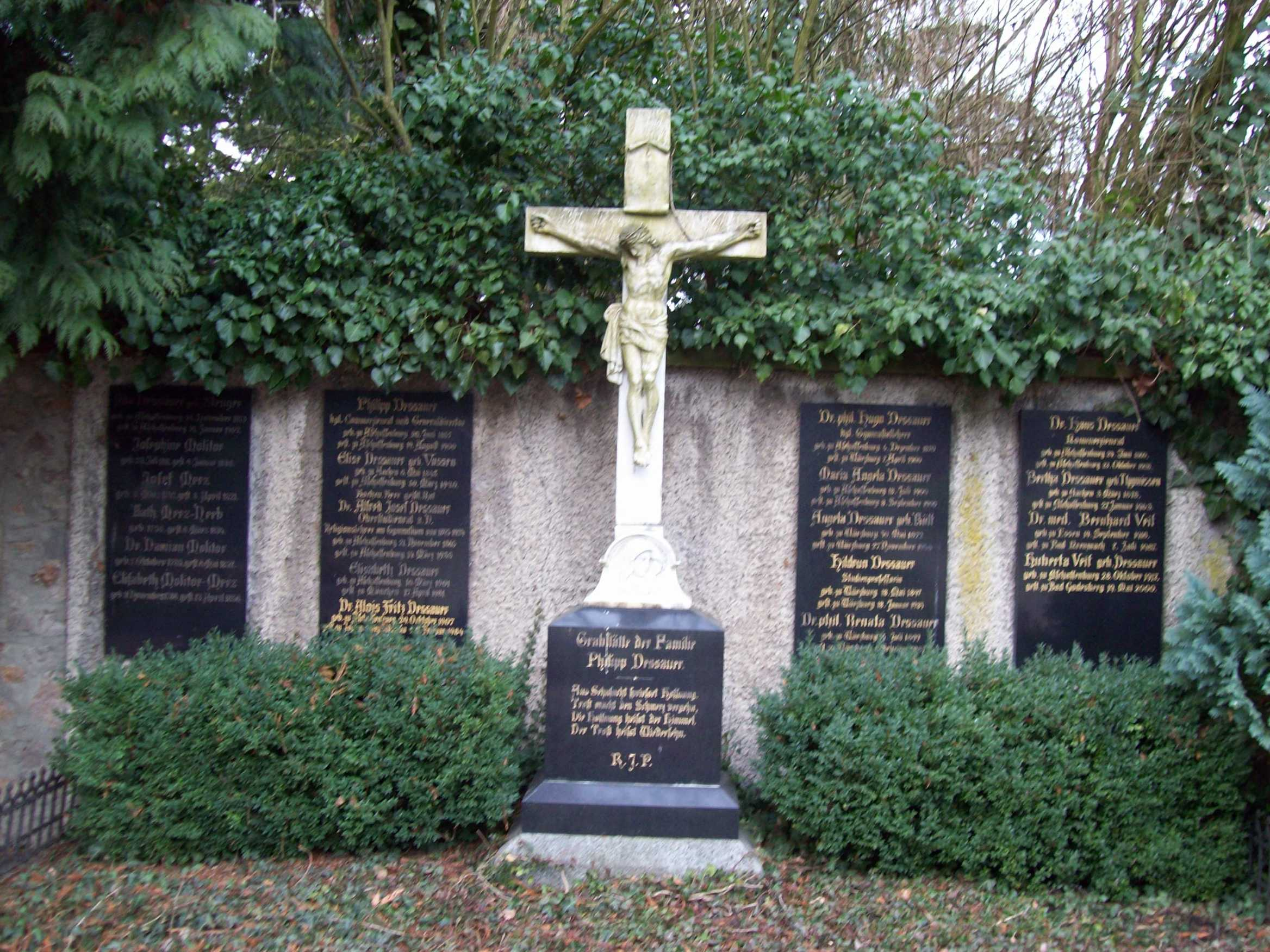 Familiengrab Phlipp Dessauer Altstadtfriedhof Aschaffenburg